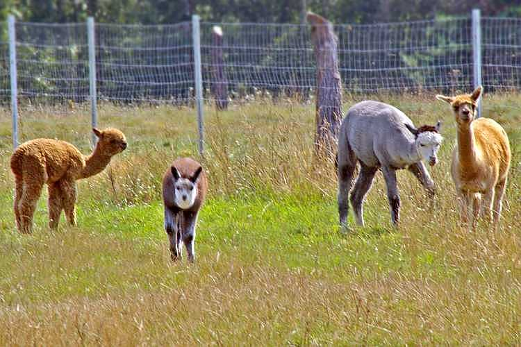 Alpakas auf einer Farm in Mecklenburg-Vorpommern